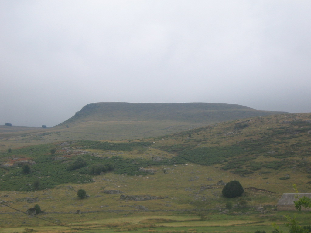 le truc de l'Agullio au nord de l'Aubrac (Massif central - France)